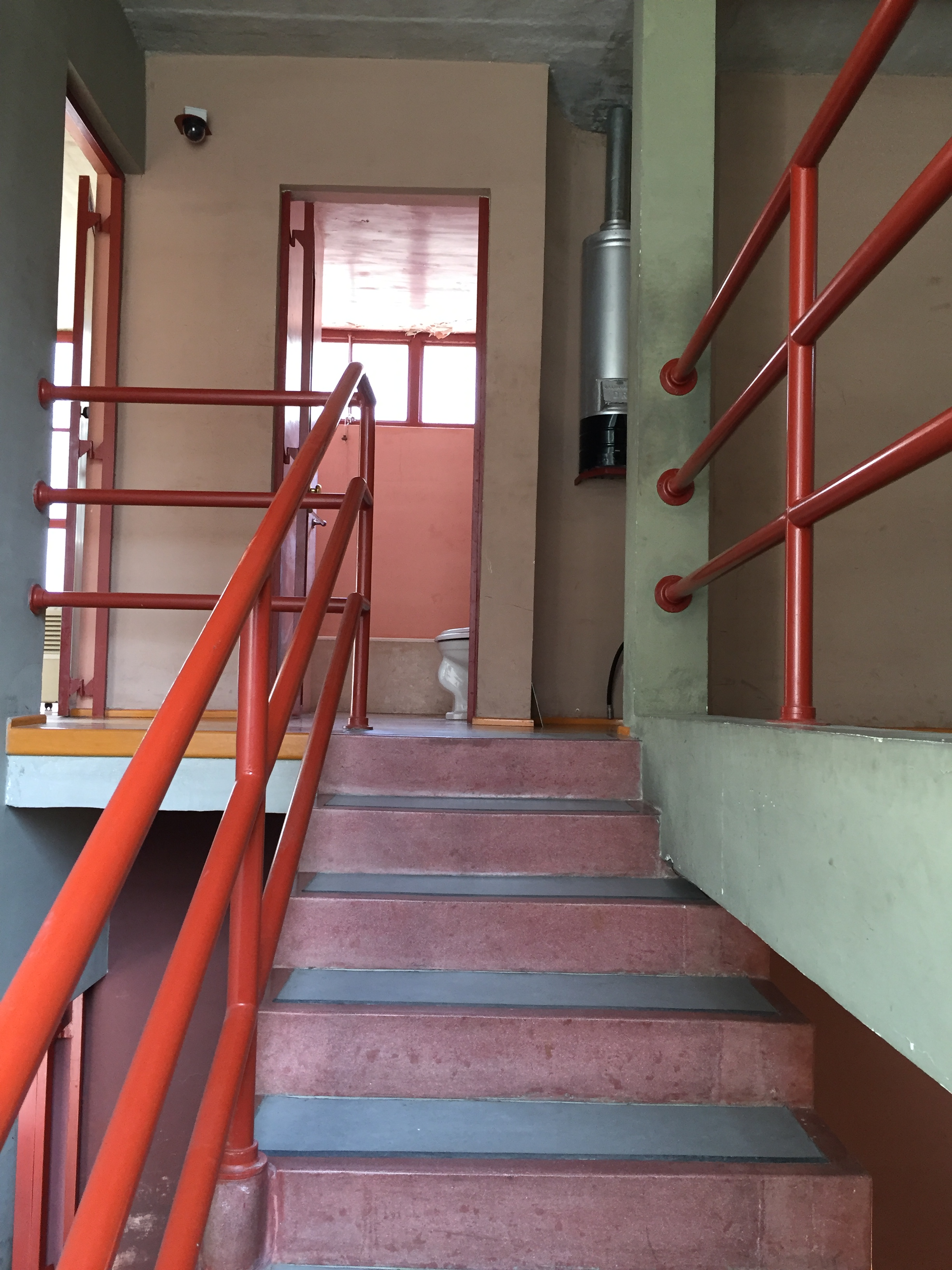 Escalera que conecta los pisos en la casa Juan O'Gorman ubicado en el Museo Casa Estudio Diego Rivera y Frida Kahlo en San Ángel. Se distinguen los característicos barandales tubulares.